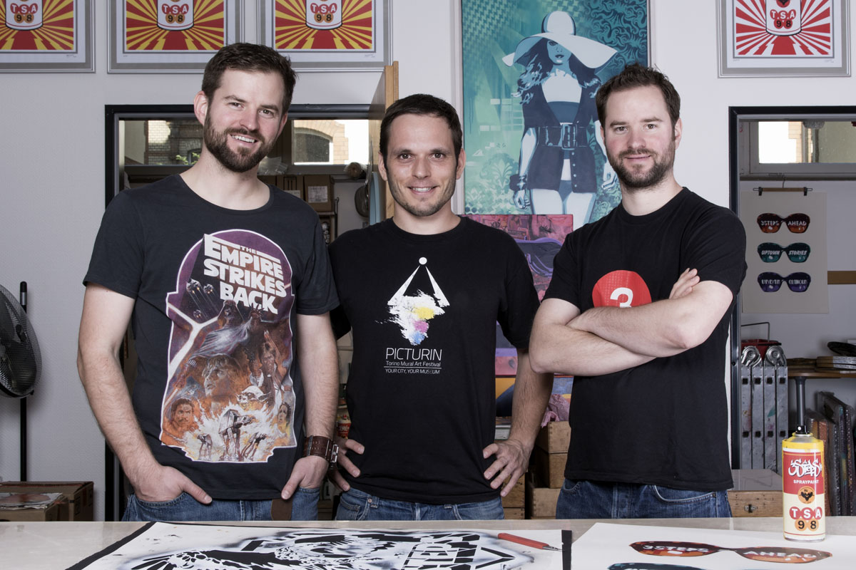 3Steps | Kai Krieger, Joachim Pitt, Uwe Krieger | Atelier Gießen 2014 | 3StepsCrew